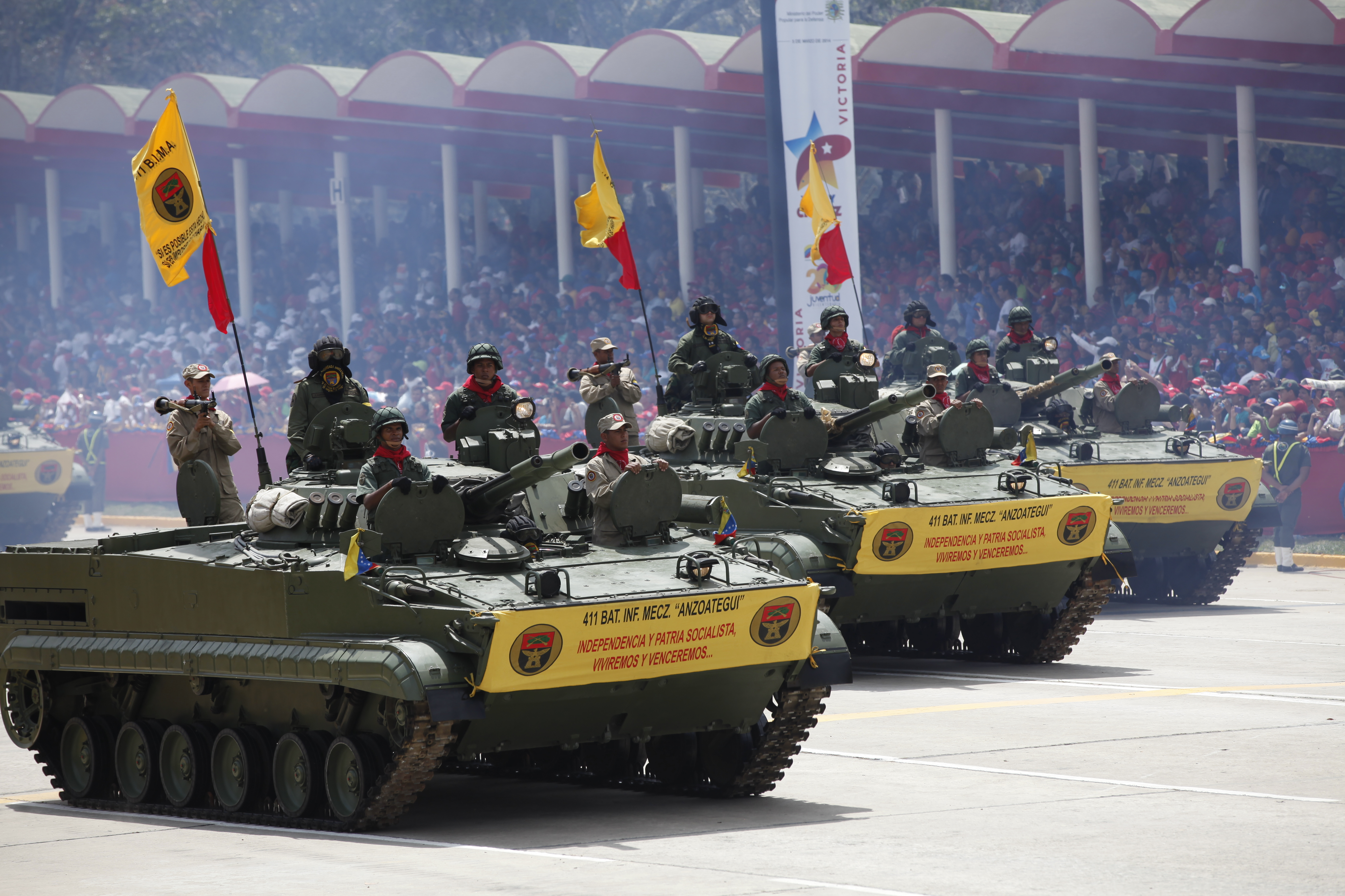 Caracas (Venezuela), 05 de Marzo del 2014. El Canciller del Ecuador, Ricardo Patiño, participó en los actos de conmemoración de la muerte del Comandante Hugo Chávez Frías. Foto: Xavier Granja Cedeño / Cancilleria Ecuador